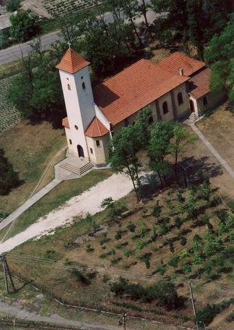 Jakabszállás, Hungary, aerialphotography, Jézus Szíve római katolikus templom